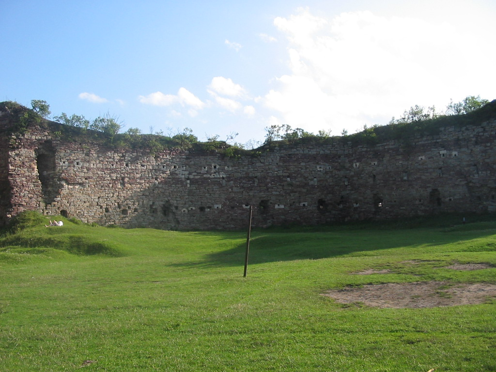 Castle ruins, Buchach, Ukraine